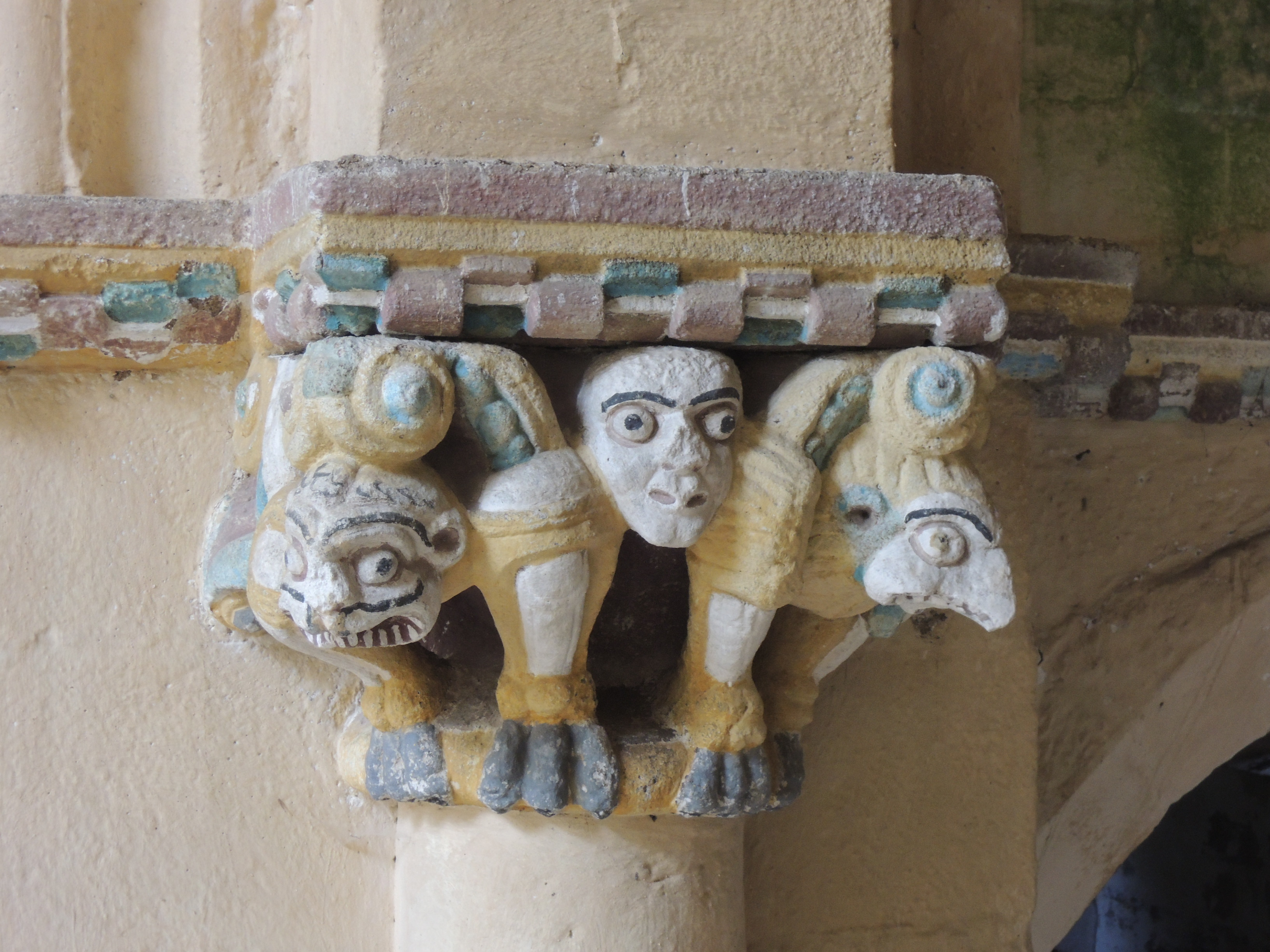 Monasterio de San Paio de Abeleda